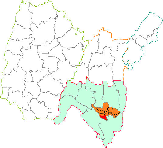 carte administrative Ain localisation arrondissement de Belley, Canton de Virieu-le-Grand, commune de contrevoz